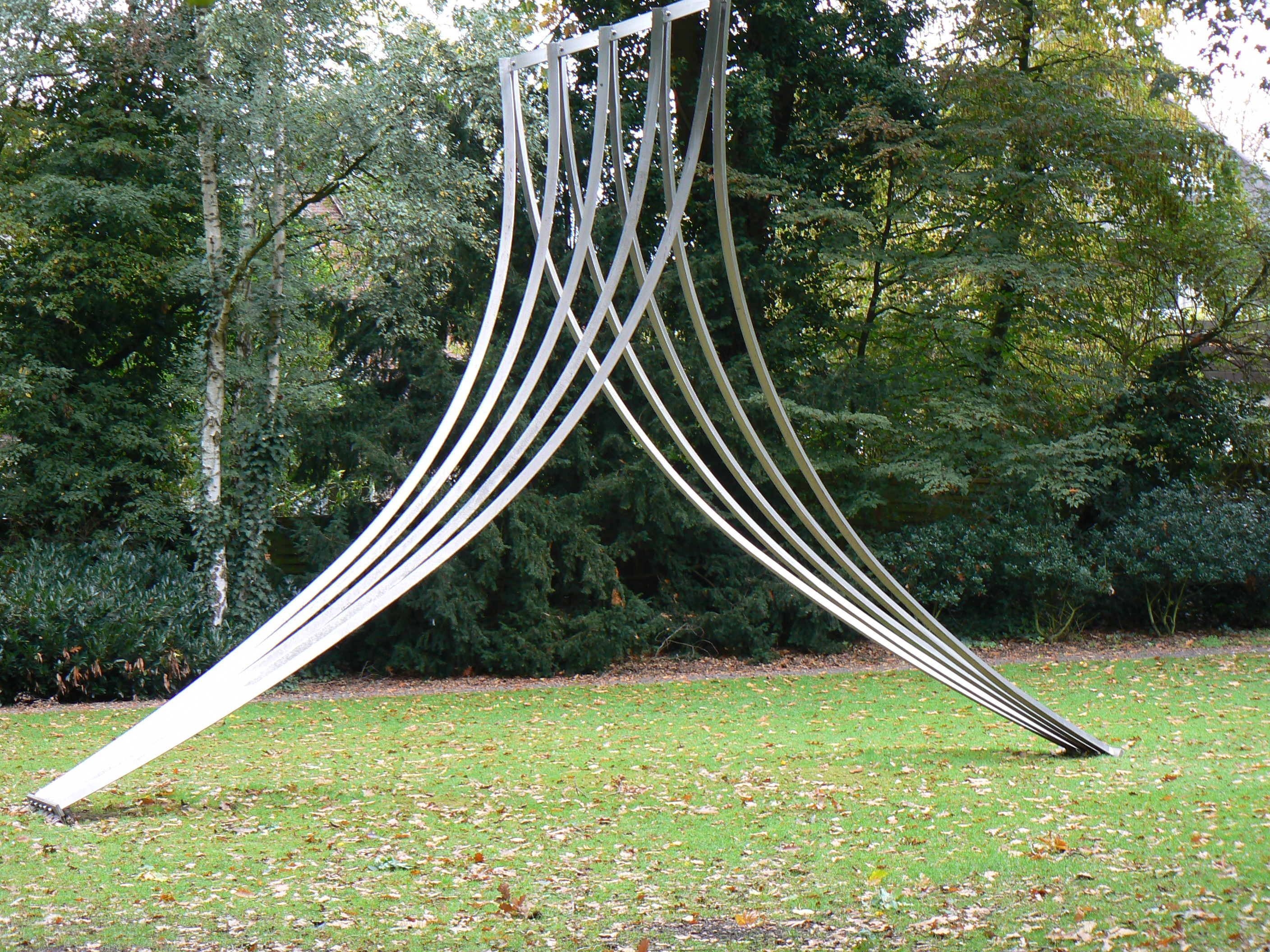 sculpture Uit het gezicht verleizen (1986/9) by Henk Visch in Nordhorn/Germany